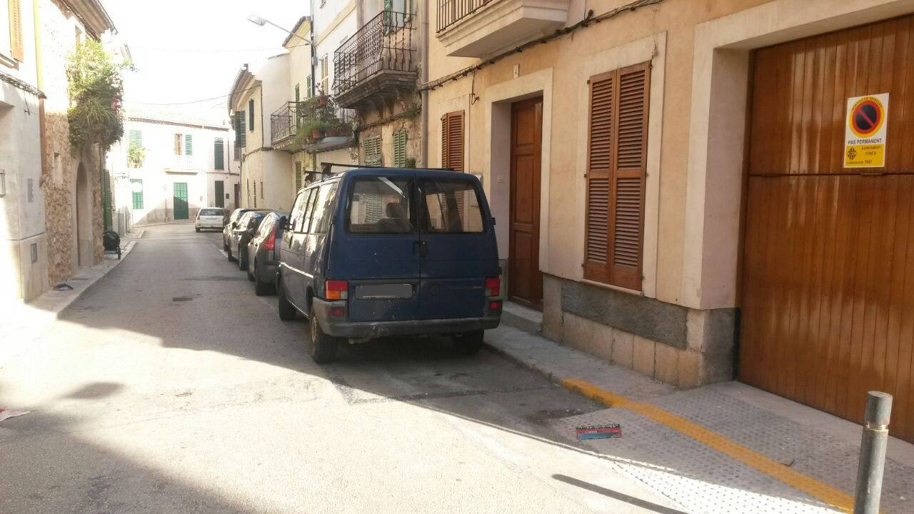 Imagen de parte del barrio judío de Inca situado en la calle Can Valella.